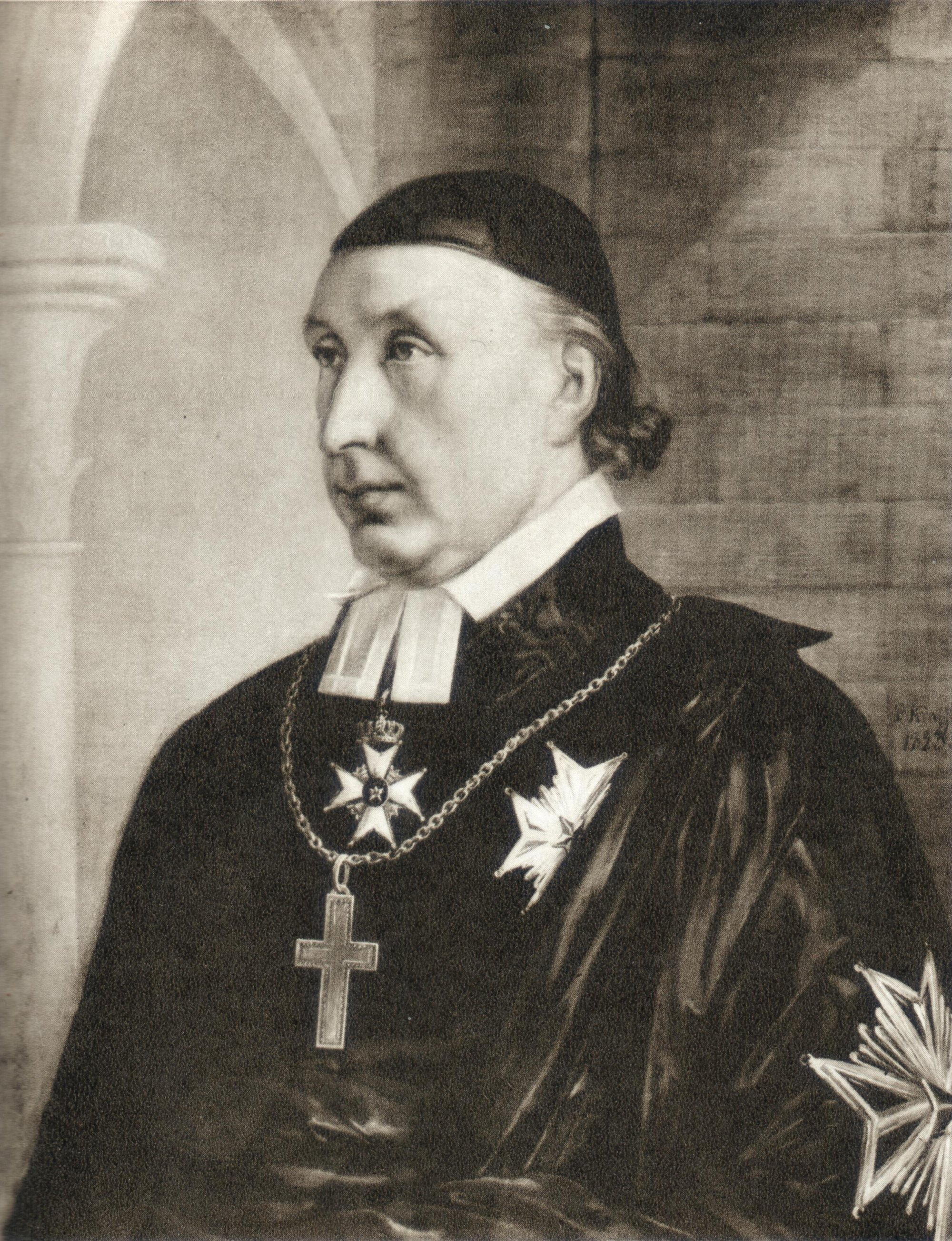 Ludvig Carlsson Mörner (1764-1823), biskop i Växjö